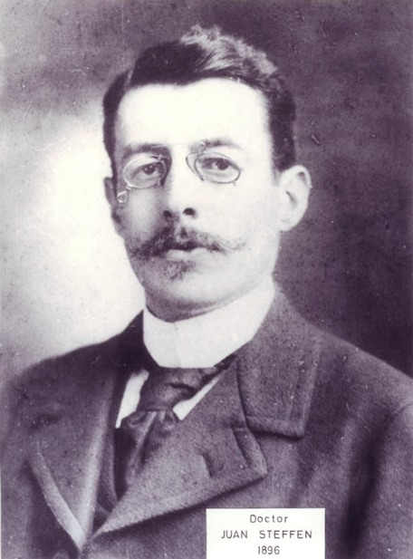 Dr. Hans Steffen tambien llamado Juan Steffen.